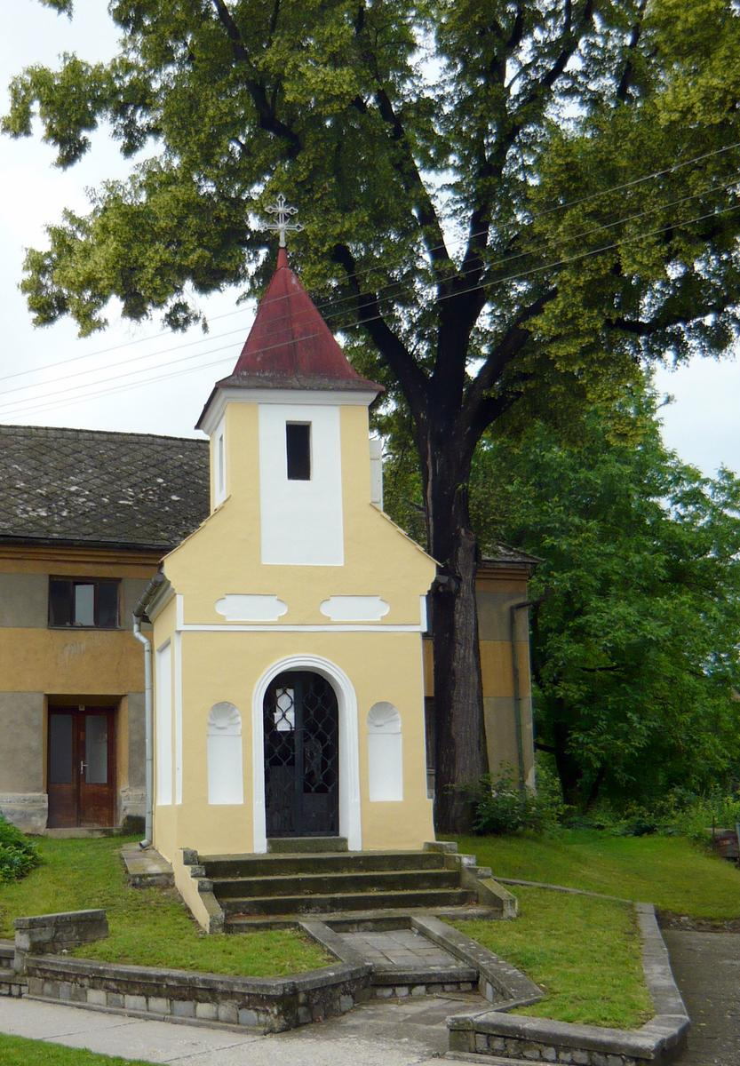 Kaple sv. Floriána (Čelčice), náves, Čelčice